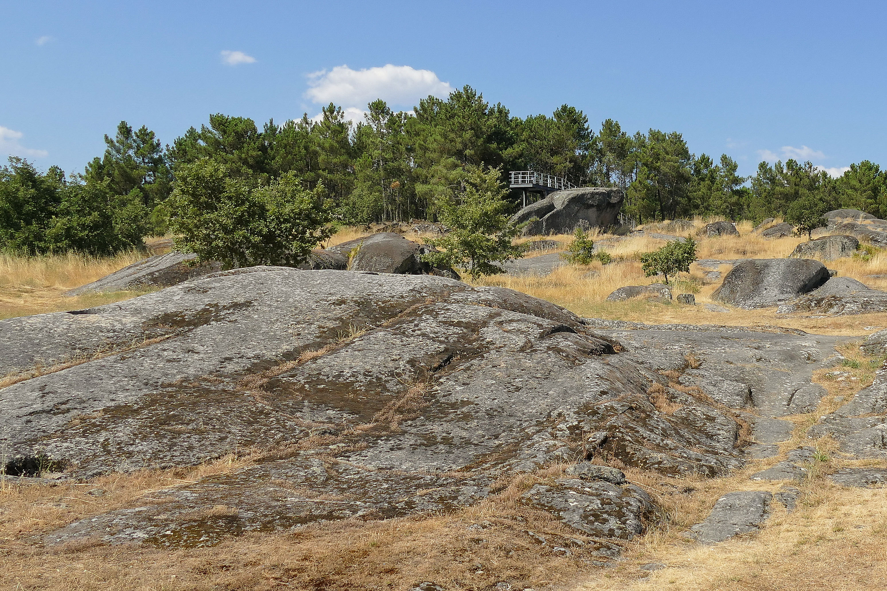 Überblick über das Gelände vom Info-Center aus